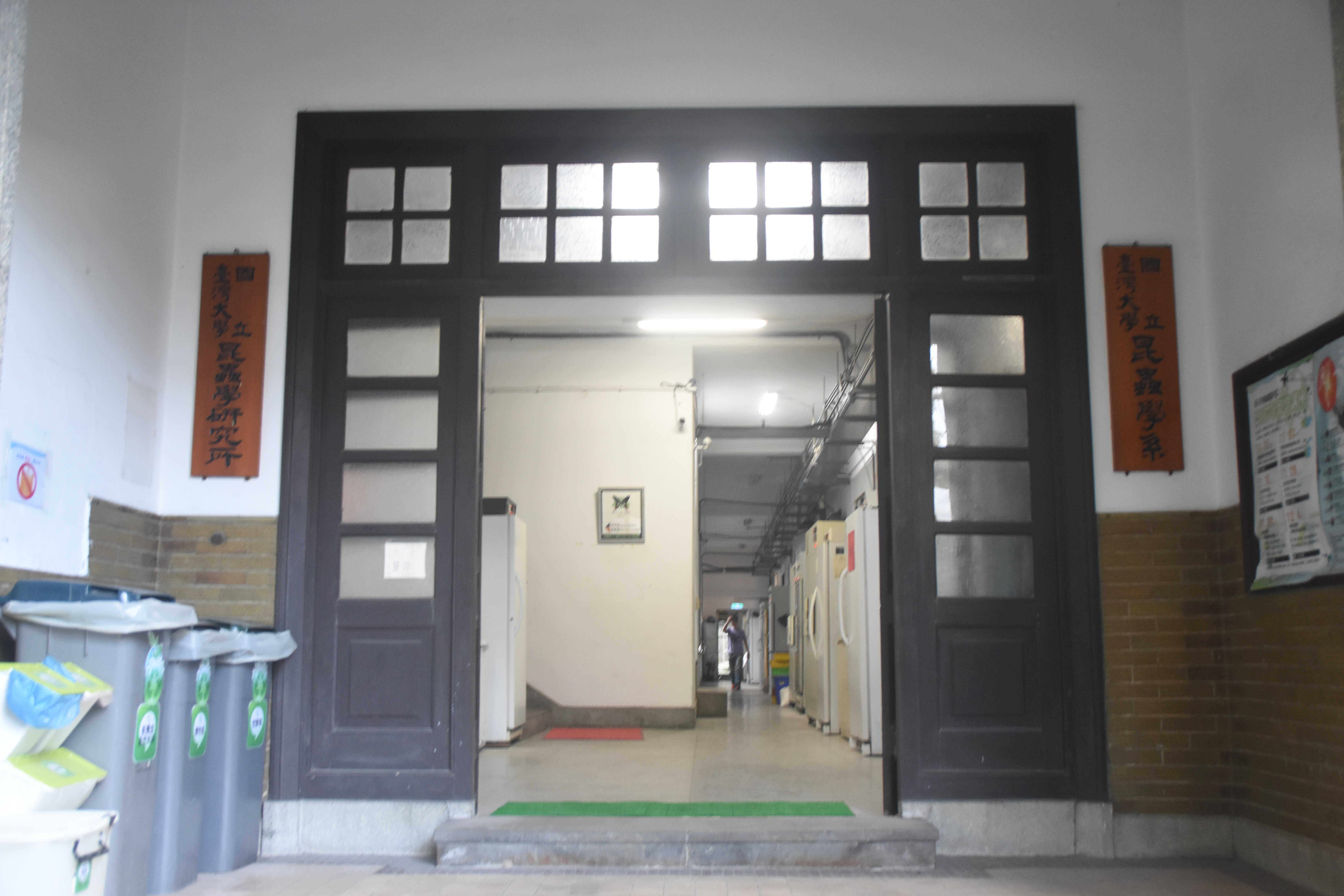 臺大昆蟲館創立於1936年，位於蟾蜍山下，地址為羅斯福路4段113巷27號。昆蟲館為磚造2層樓房，建坪約1,000平方公尺，擁有獨特的歷史。